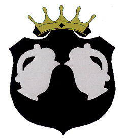 Wappen der Gemeinde Pulkau in Österreich